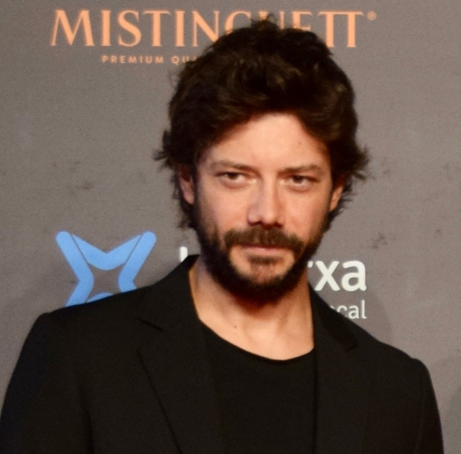 Festival de cinema de Sitges 2018